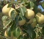 Small Foto